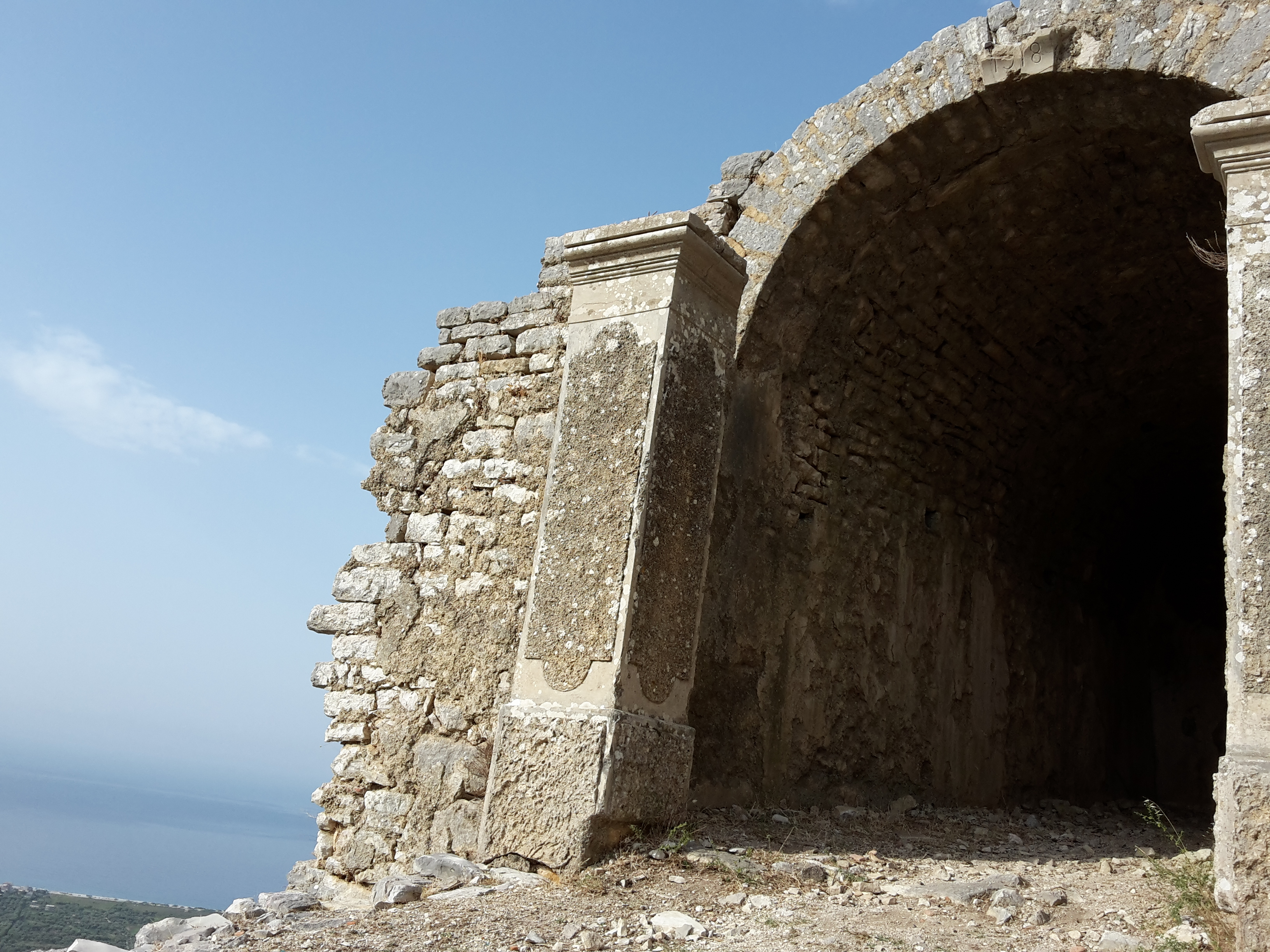 Kalaja E Borshit